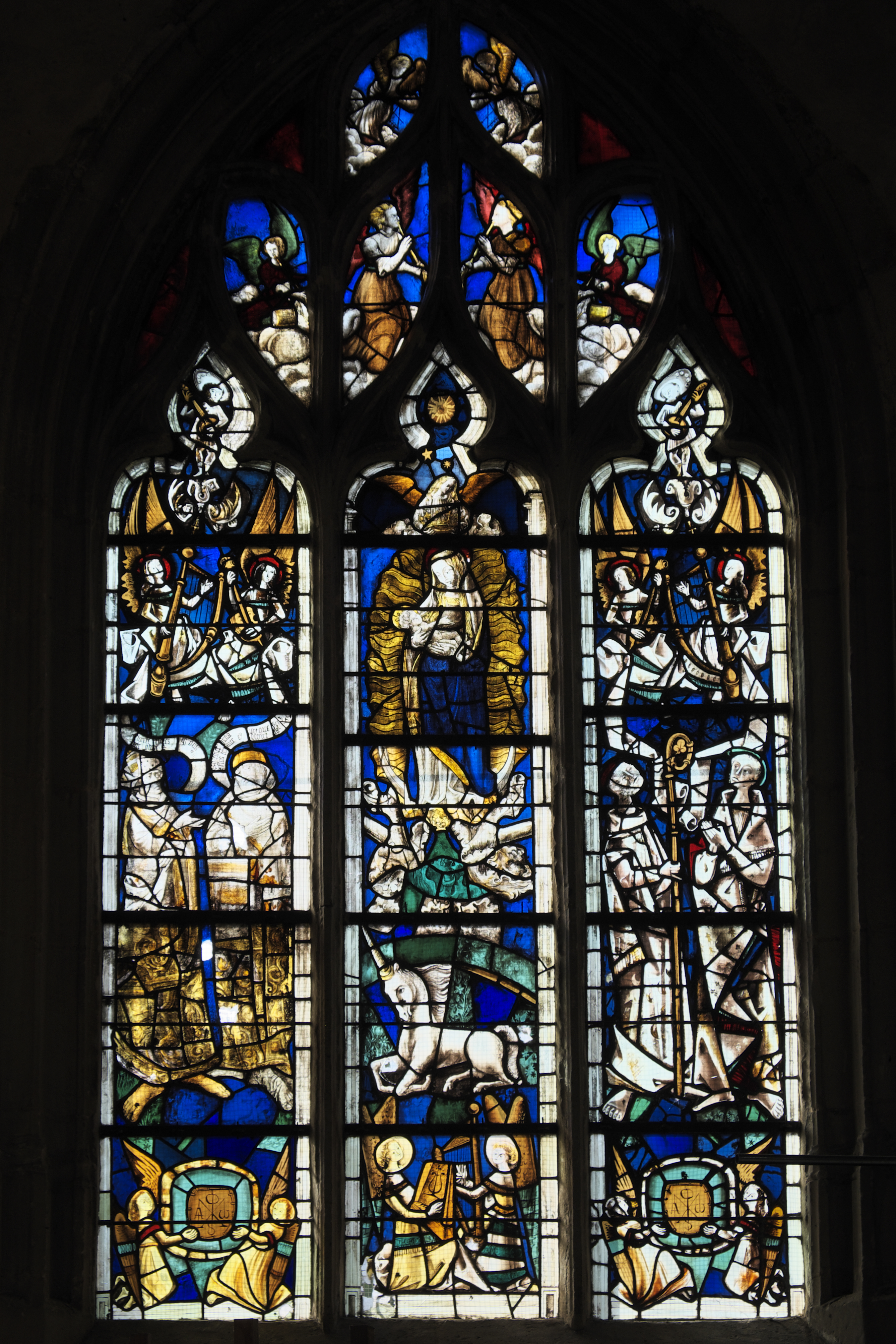 Katholische Kirche Saint-Hilaire in Tillières-sur-Avre im Département Eure (Region Normandie/Frankreich), Bleiglasfenster von Max Ingrand, mit Fragmenten aus dem ersten Drittel des 16. Jahrhundert; Darstellung: Unbefleckte Empfängnis